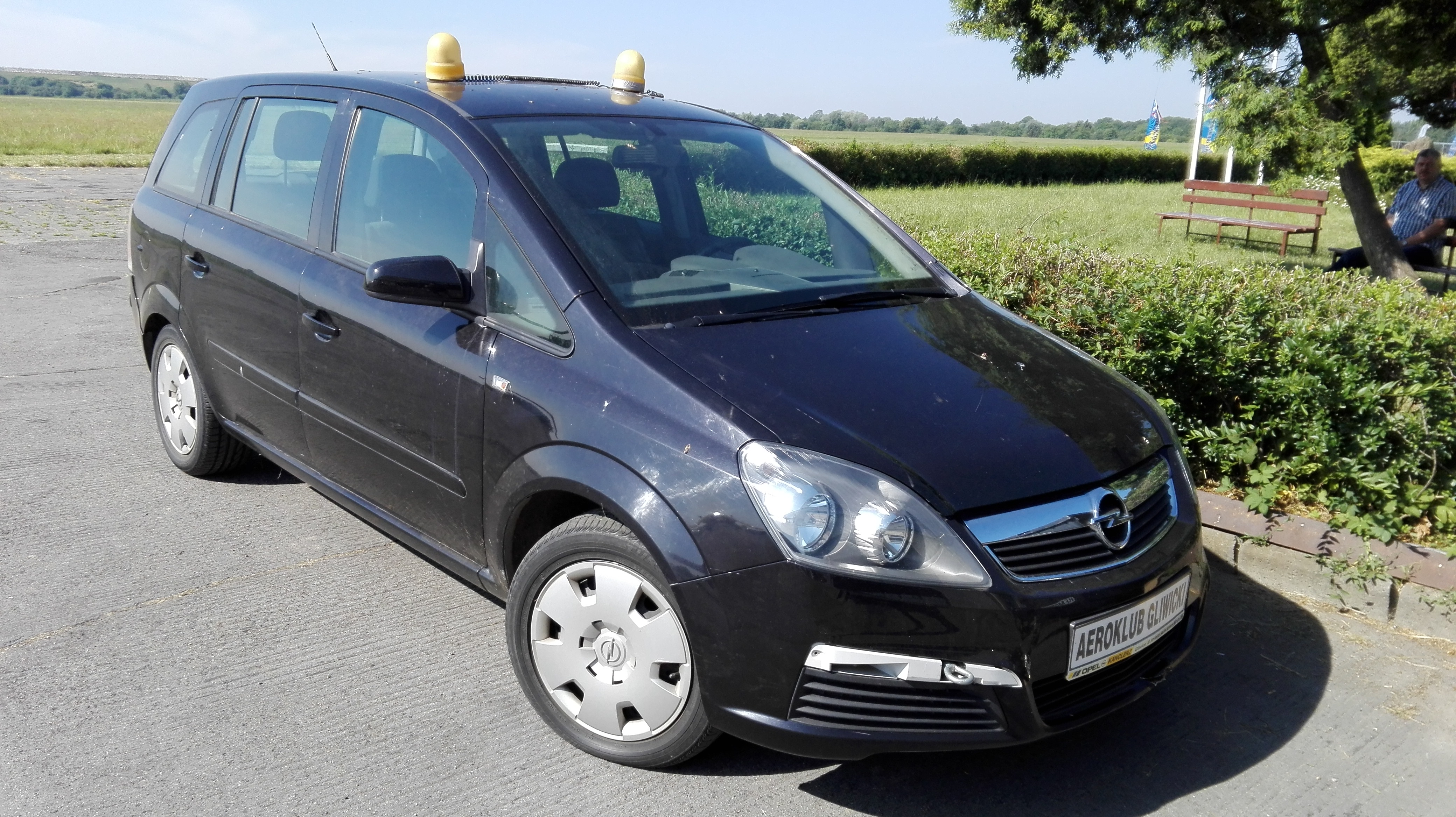 Opel Zafira 1.8